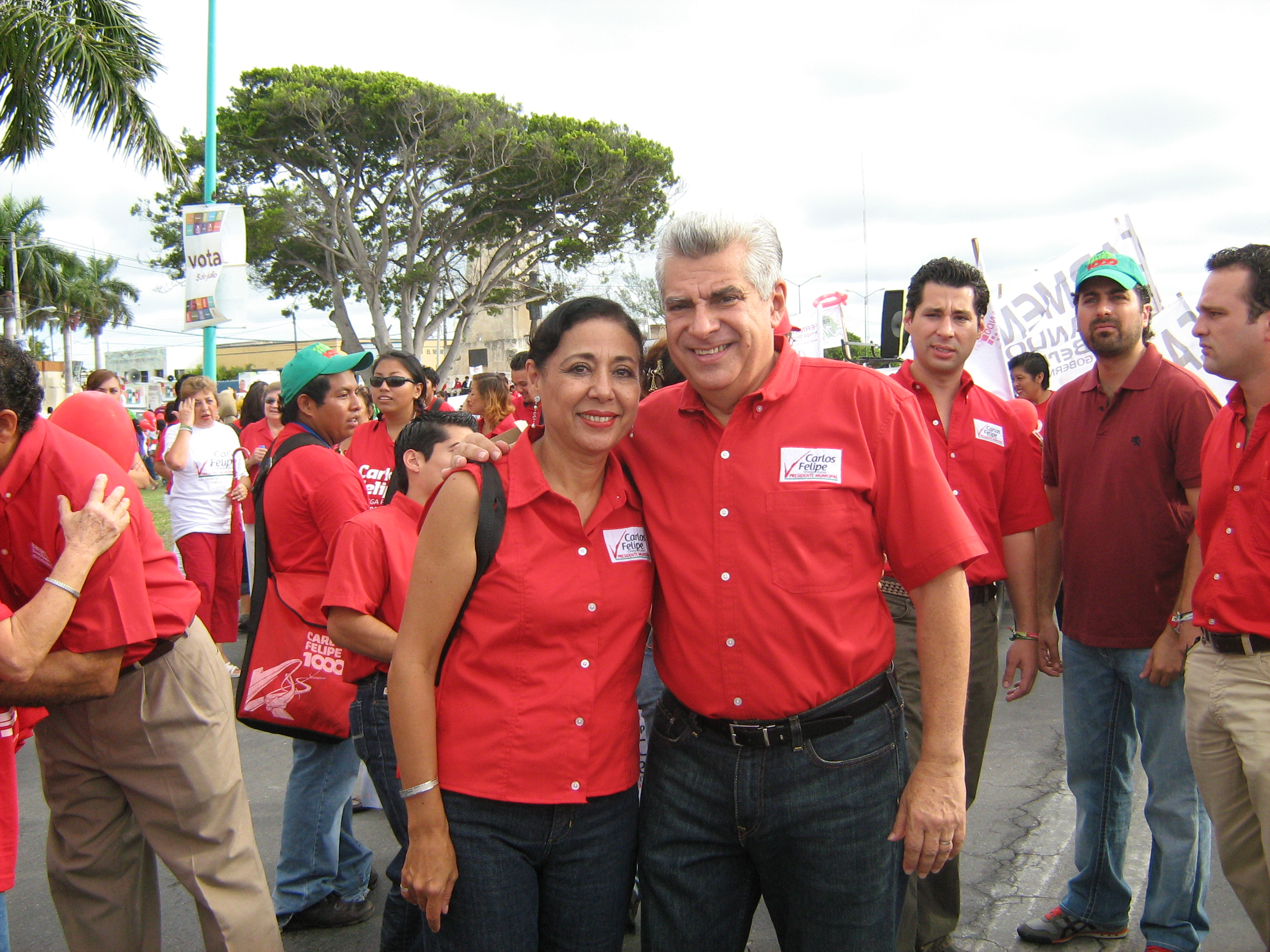 Ortega Rubio y esposa en el cierre de campaña de Ortega Bernés.